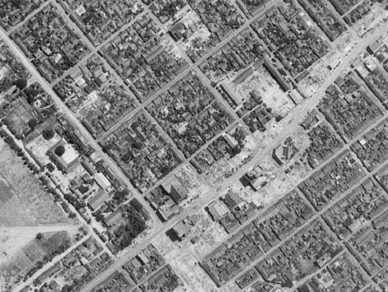 1945年7月25日原爆投下前の八丁堀周辺。中央を横断するのが相生通り。